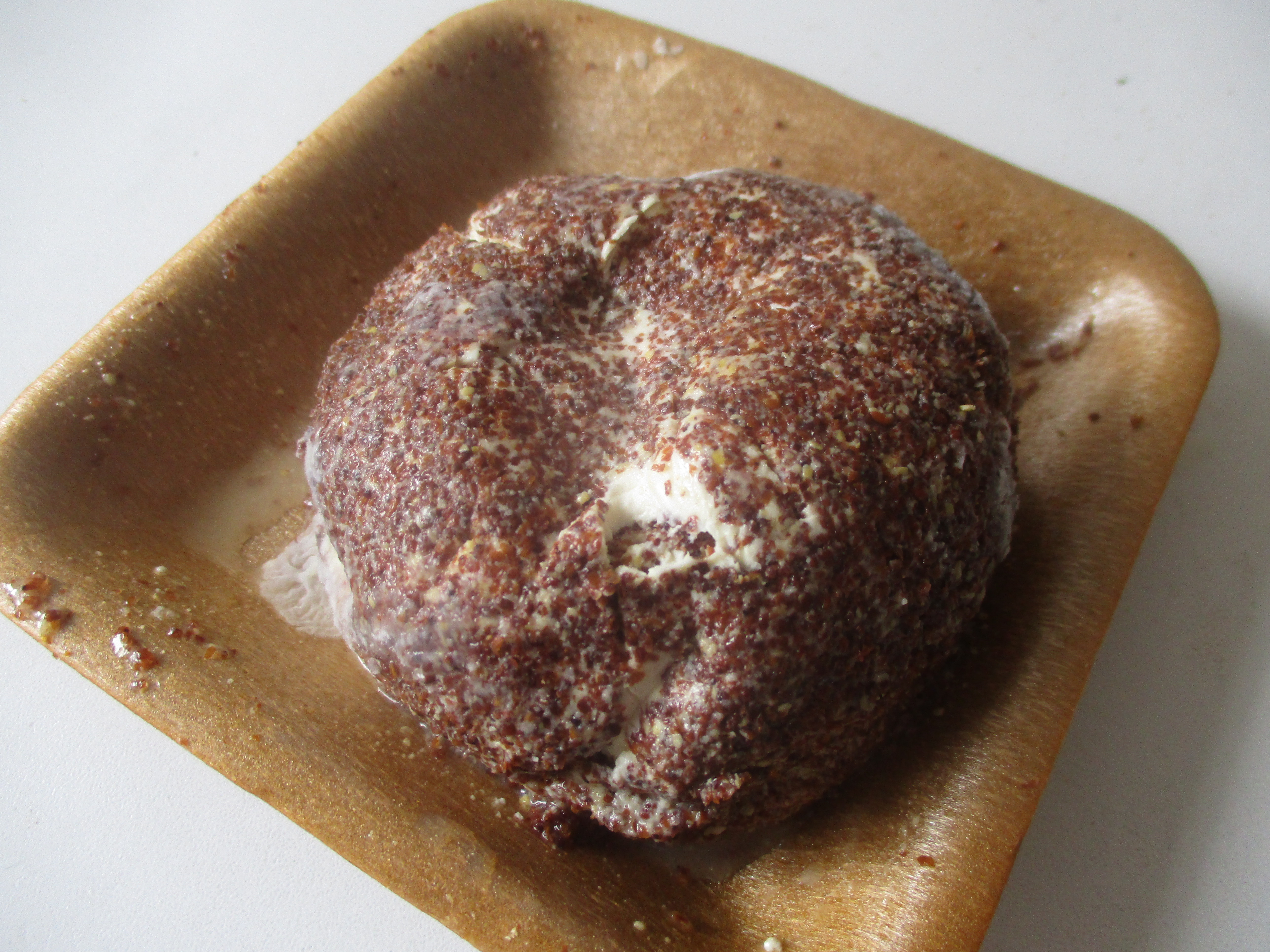 Pommard moutard, fromage bourguignon.